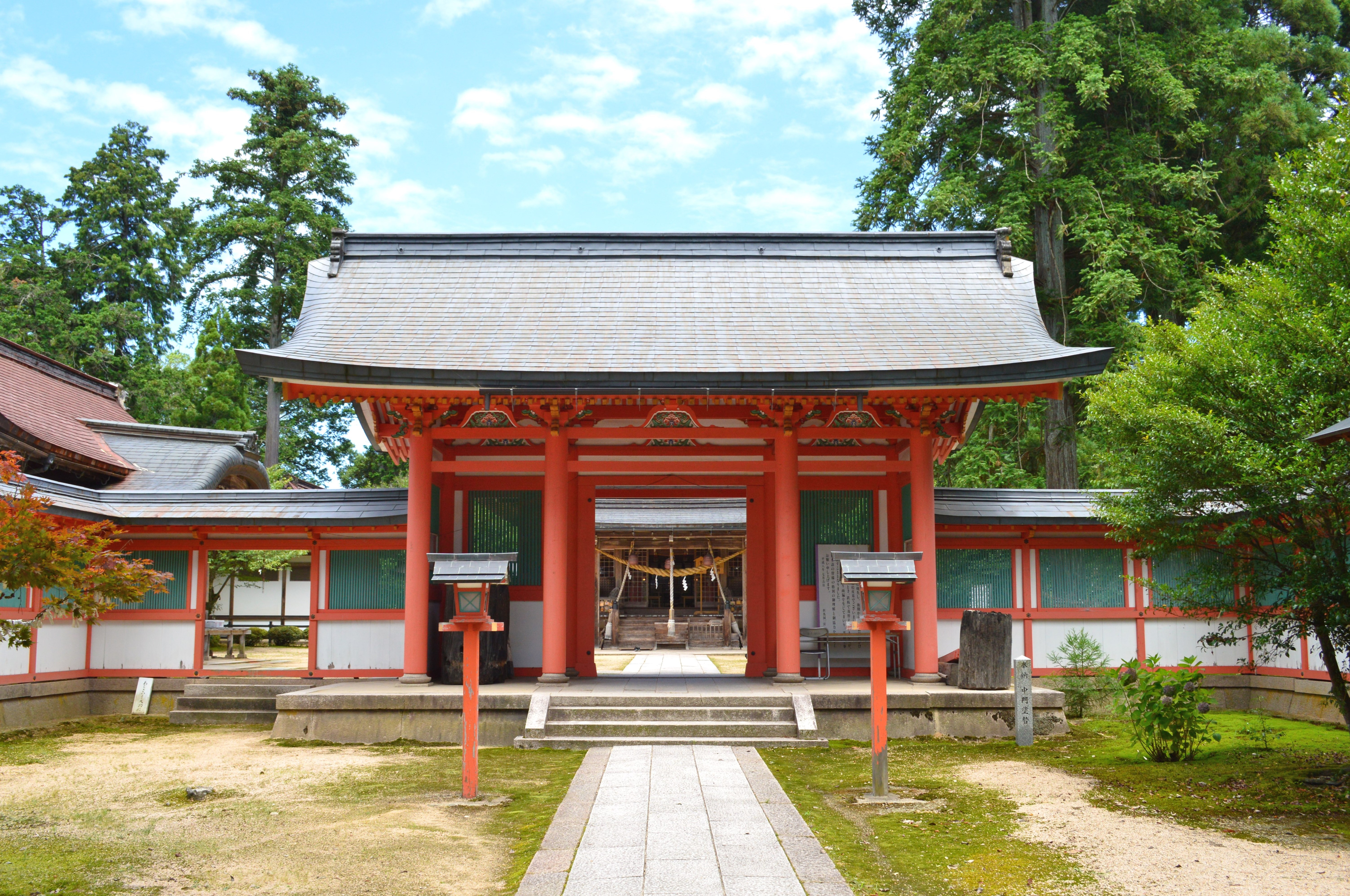 出石神社 神門